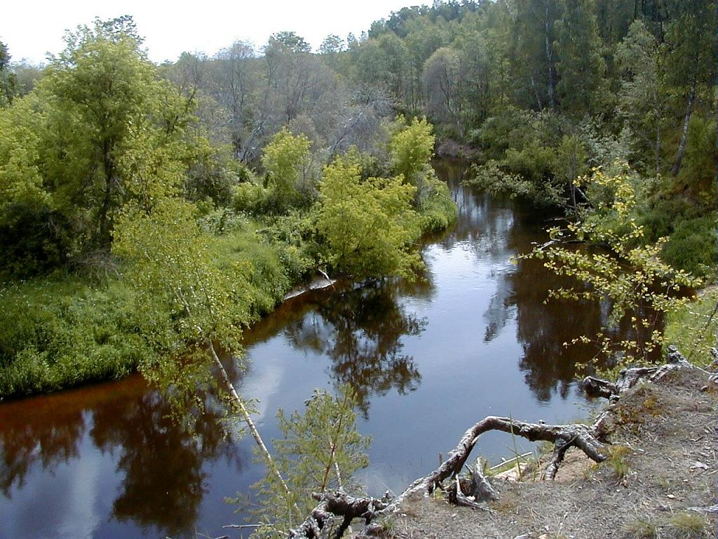 Lielā Jugla Mucenieku apkārtnē 2004-06-26